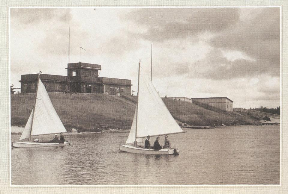 Беларуская (тарашкевіца): Купа (Kupa), возера Нарач (Narač)